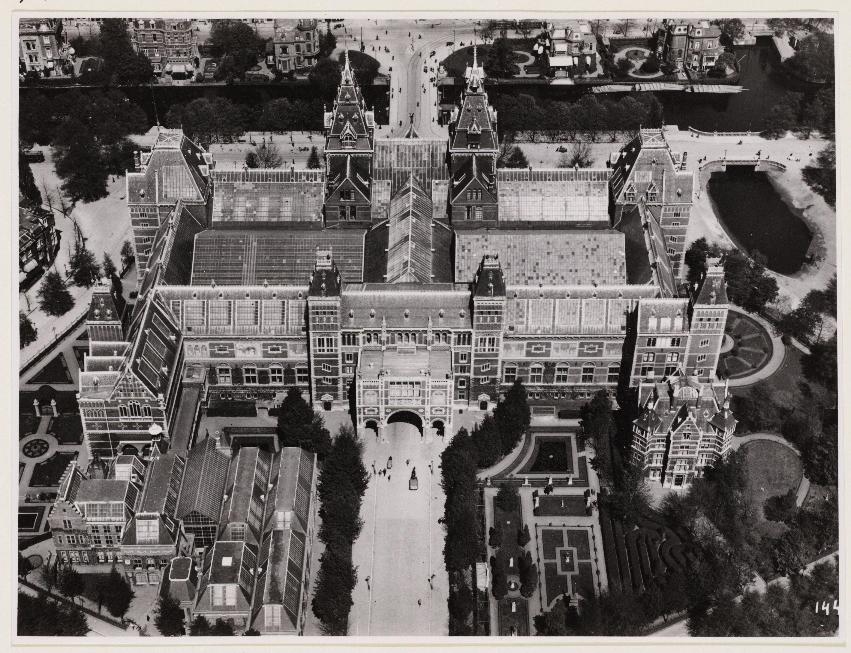 Luchtfoto van het Rijksmuseum, Stadhouderskade 42, gezien in noordelijke richting. Bovenaan de Singelgracht met de Museumbrug, rechts brug 176